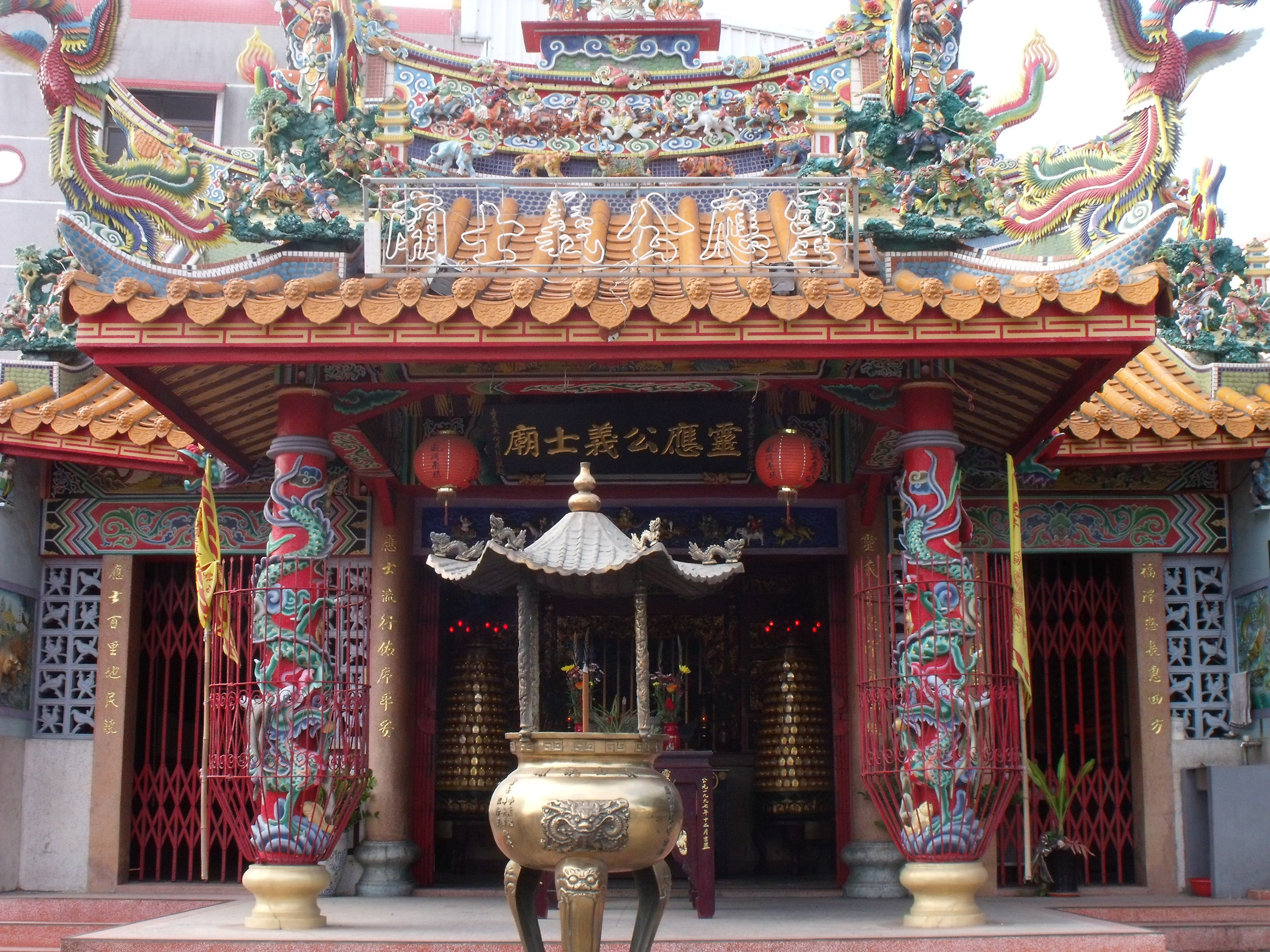 靈應公義士廟